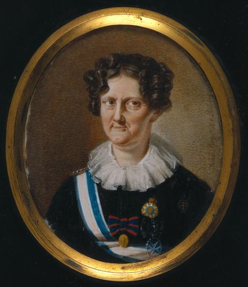 Rainha Carlota Joaquina de Portugal, Brasil e Algarves